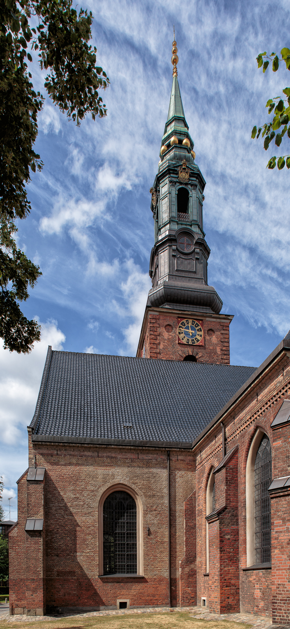 Kopenhagen - St.-Petri-Kirche - 2013